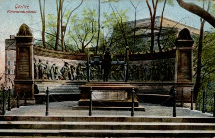 Das ehemalige Kriegerdenkmal für das 1. Schlesische Jäger-Bataillon Nr. 5 in Görlitz